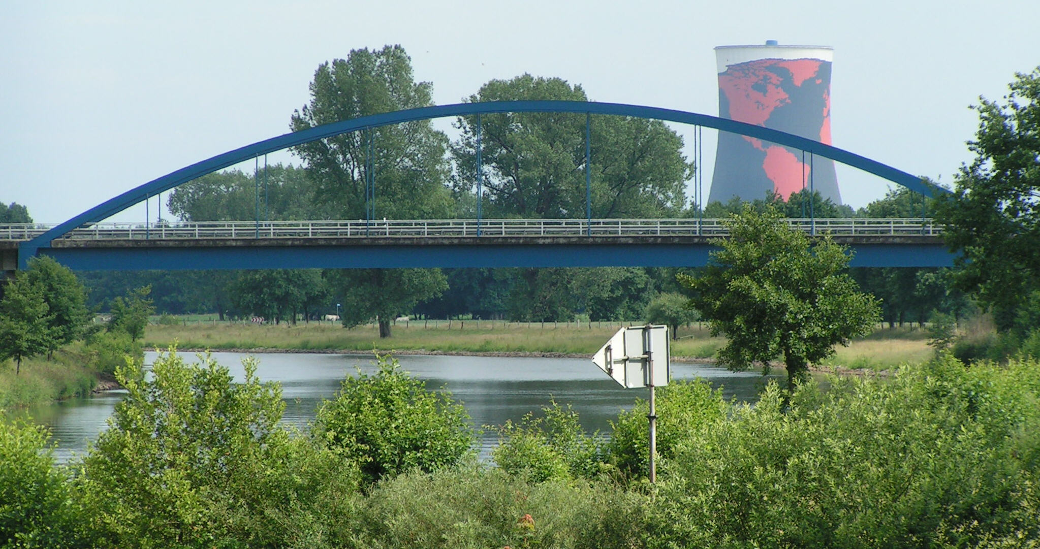 Emsbrücke in Haren; im Hintergrund der Kühlturm des ehemaligen Gaskraftwerks Hüntel